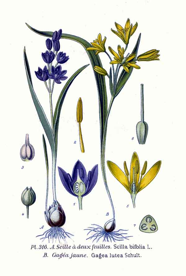 Scilla bifolia L., Gagea lutea Schult.